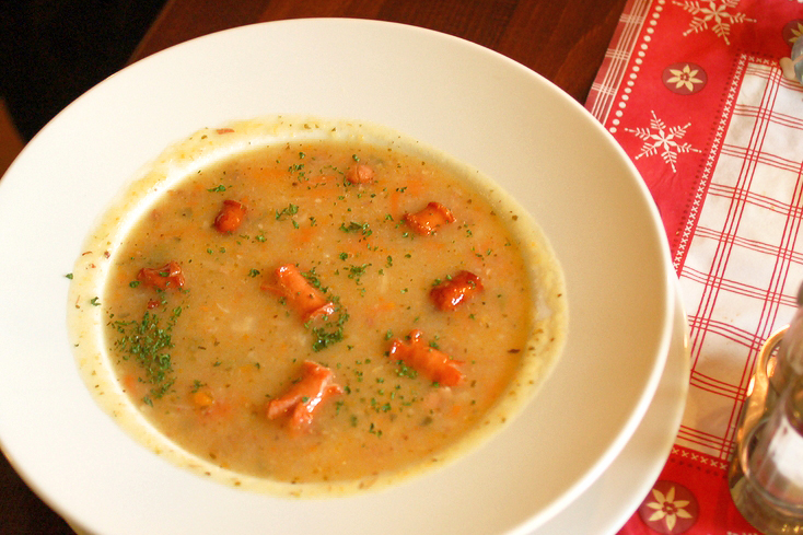 Sächsische Kartoffelsuppe, Alte Apotheke, Altkötzschenbroda